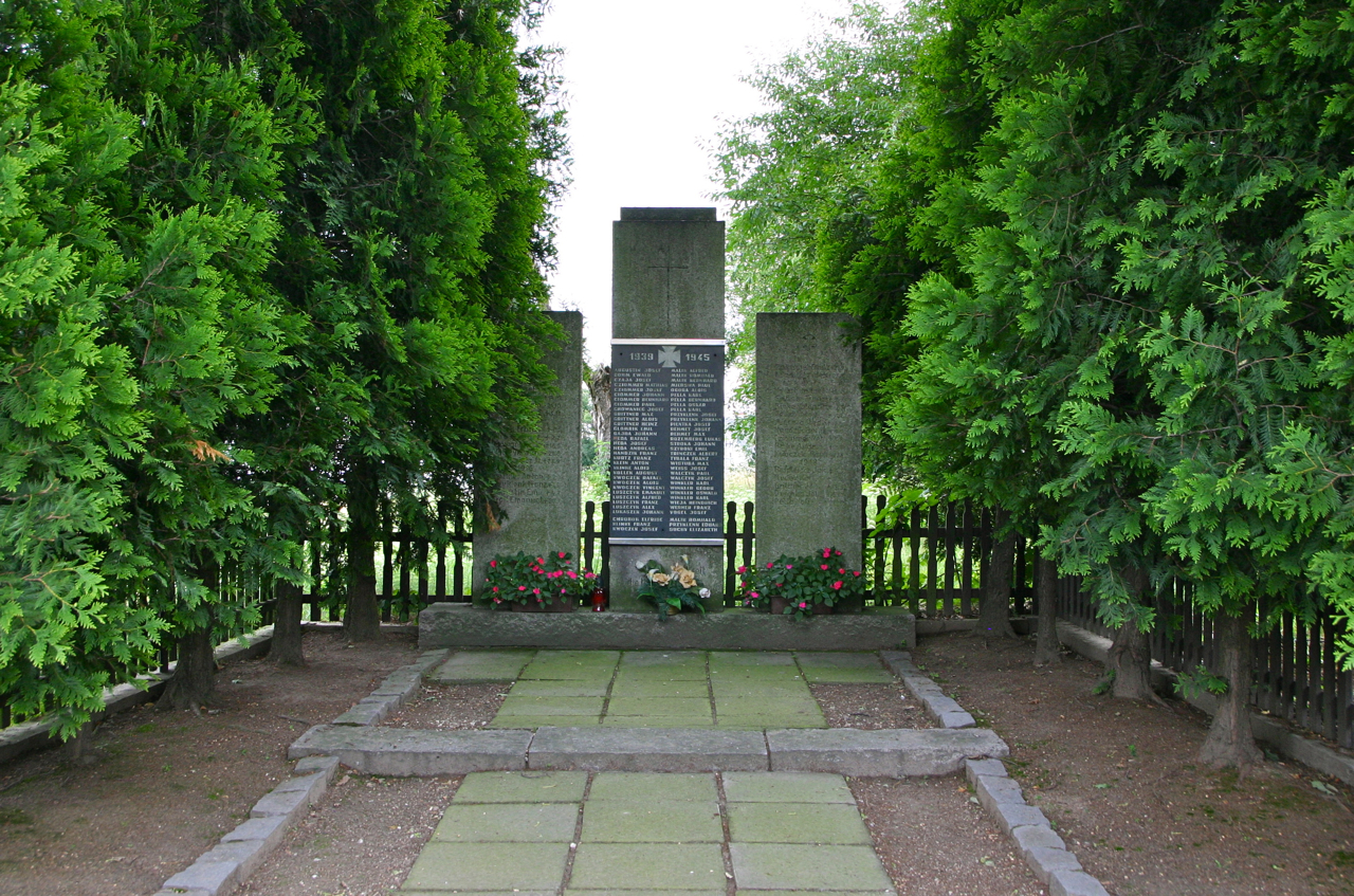 Grabina (dodatkowa nazwa w j. niem. Grabine) – wieś w Polsce położona w województwie opolskim, w powiecie prudnickim, w gminie Biała.